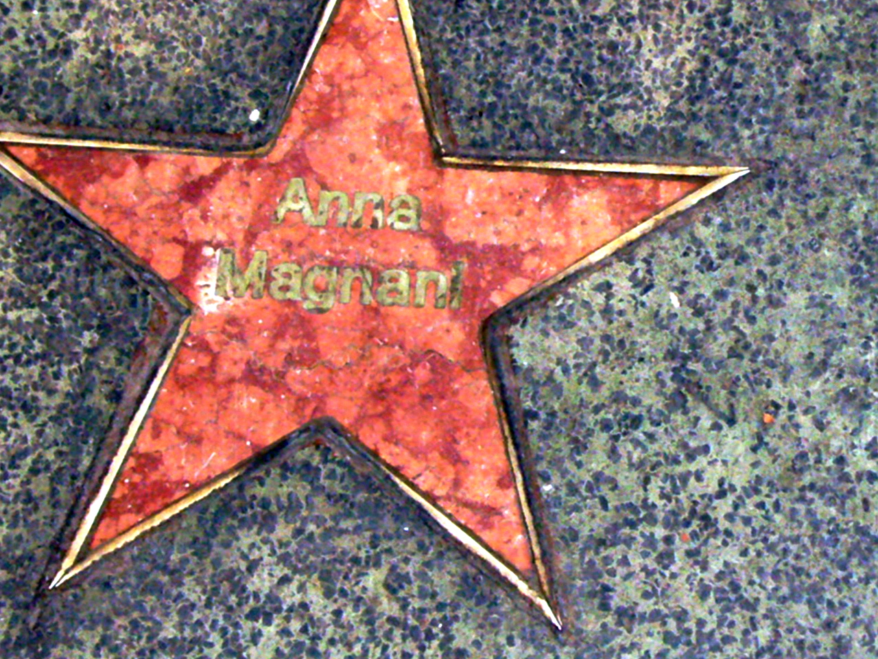 Cinecittà